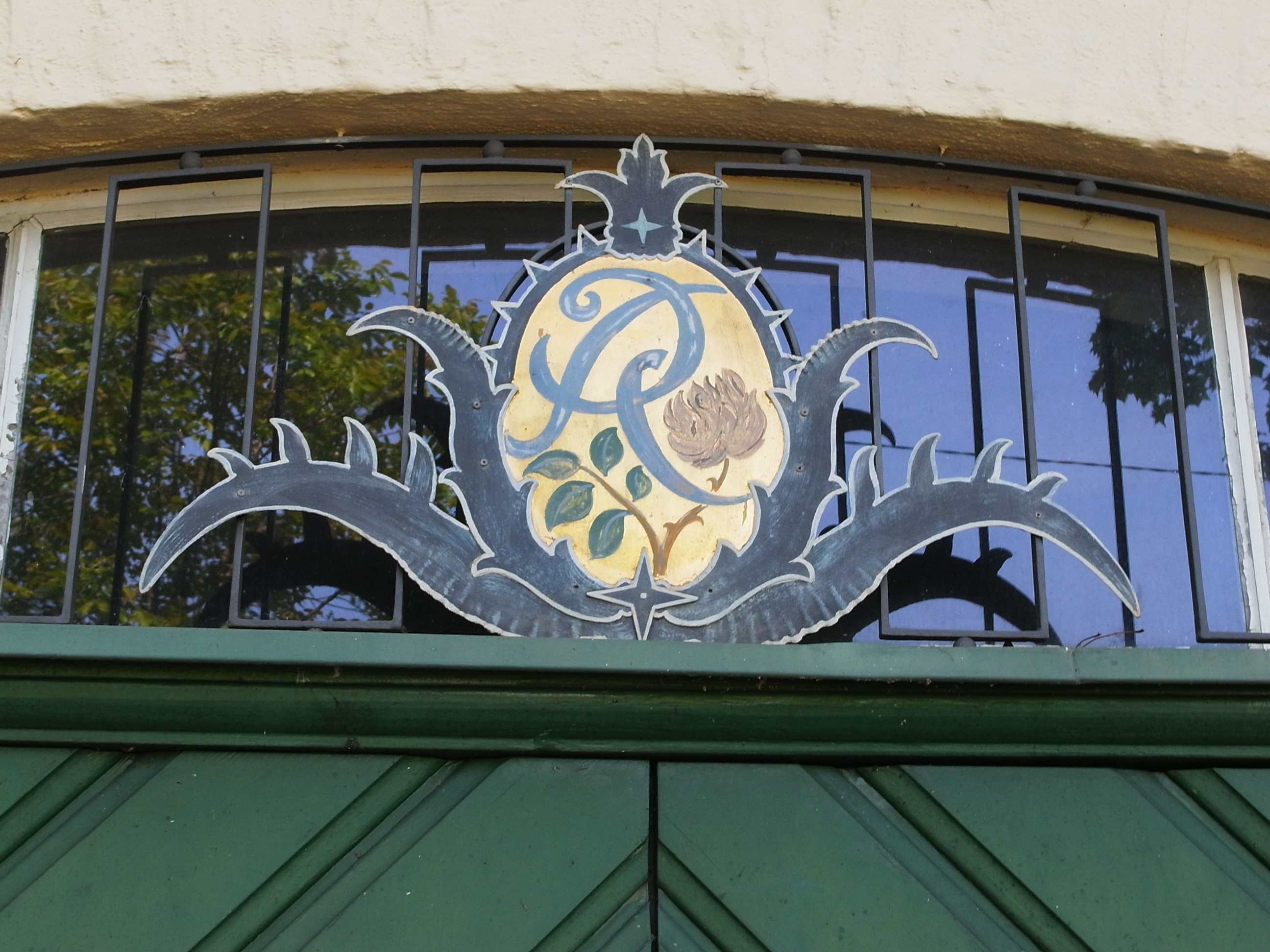 Familinschild der Fabrikantenfamilie Roser an der Villa Roser (Stuttgart-Nord)